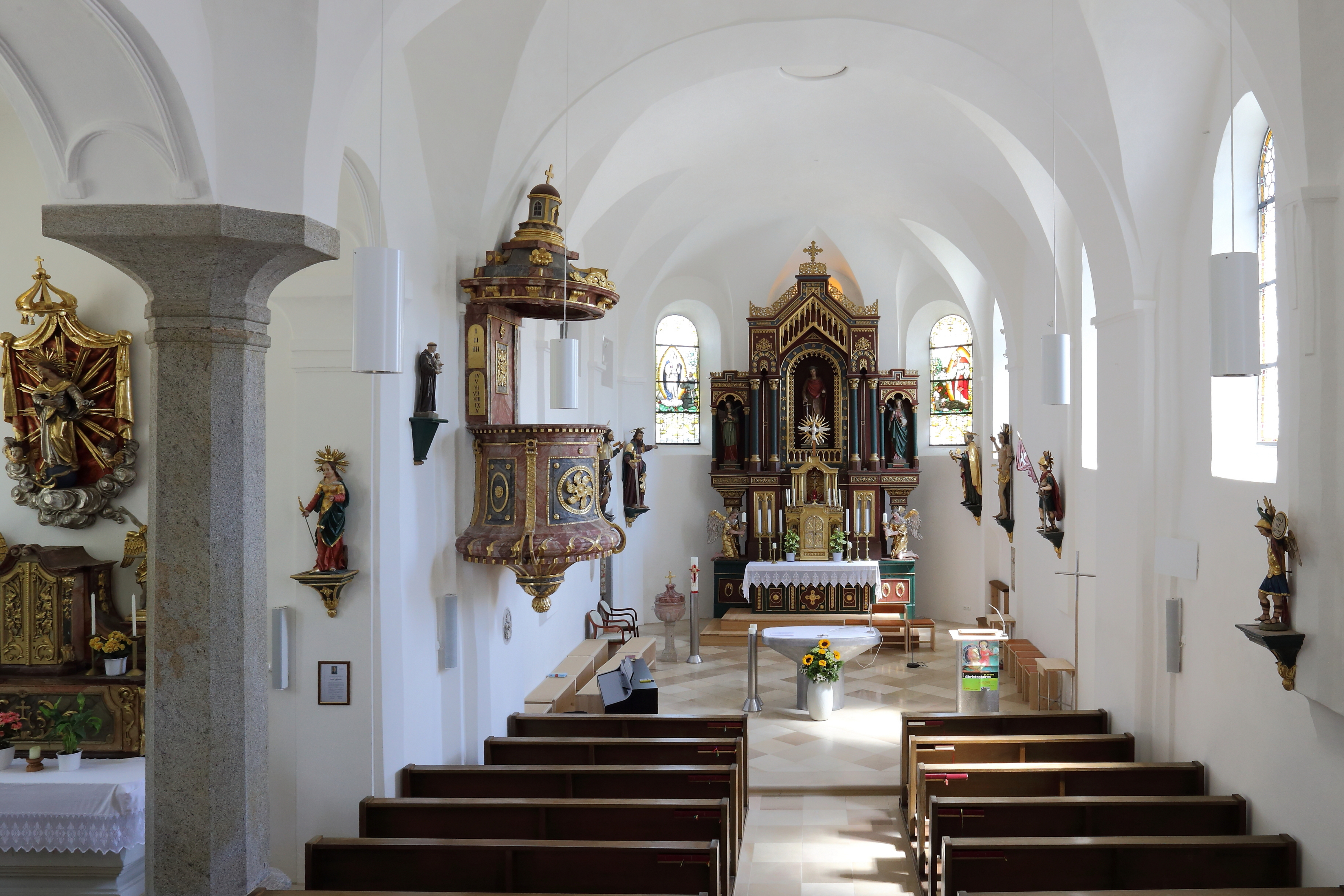 Innenansicht der katholischen Pfarrkirche hl. Pankraz in der oberösterreichischen Gemeinde Sigharting.